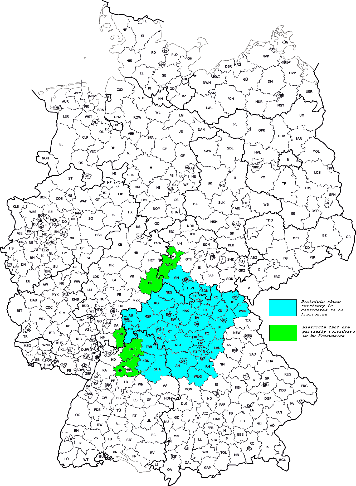 Franken (Deutschland)